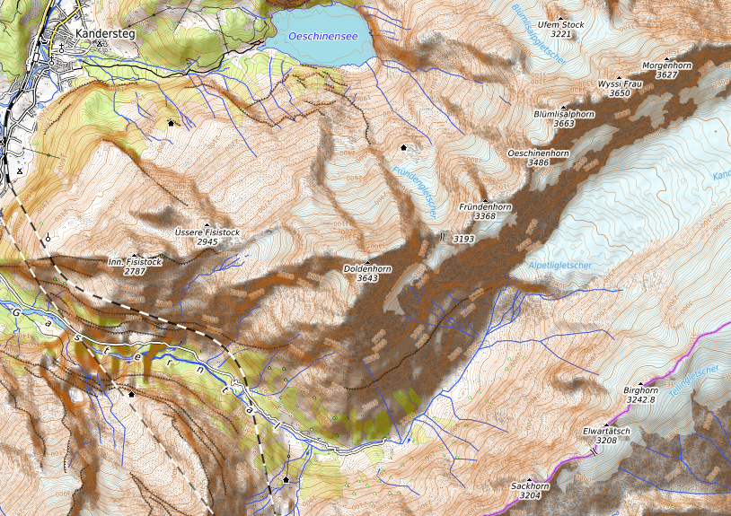 carte réalisée sur umap This map may be incomplete, and may contain errors. Don't rely solely on it for navigation.